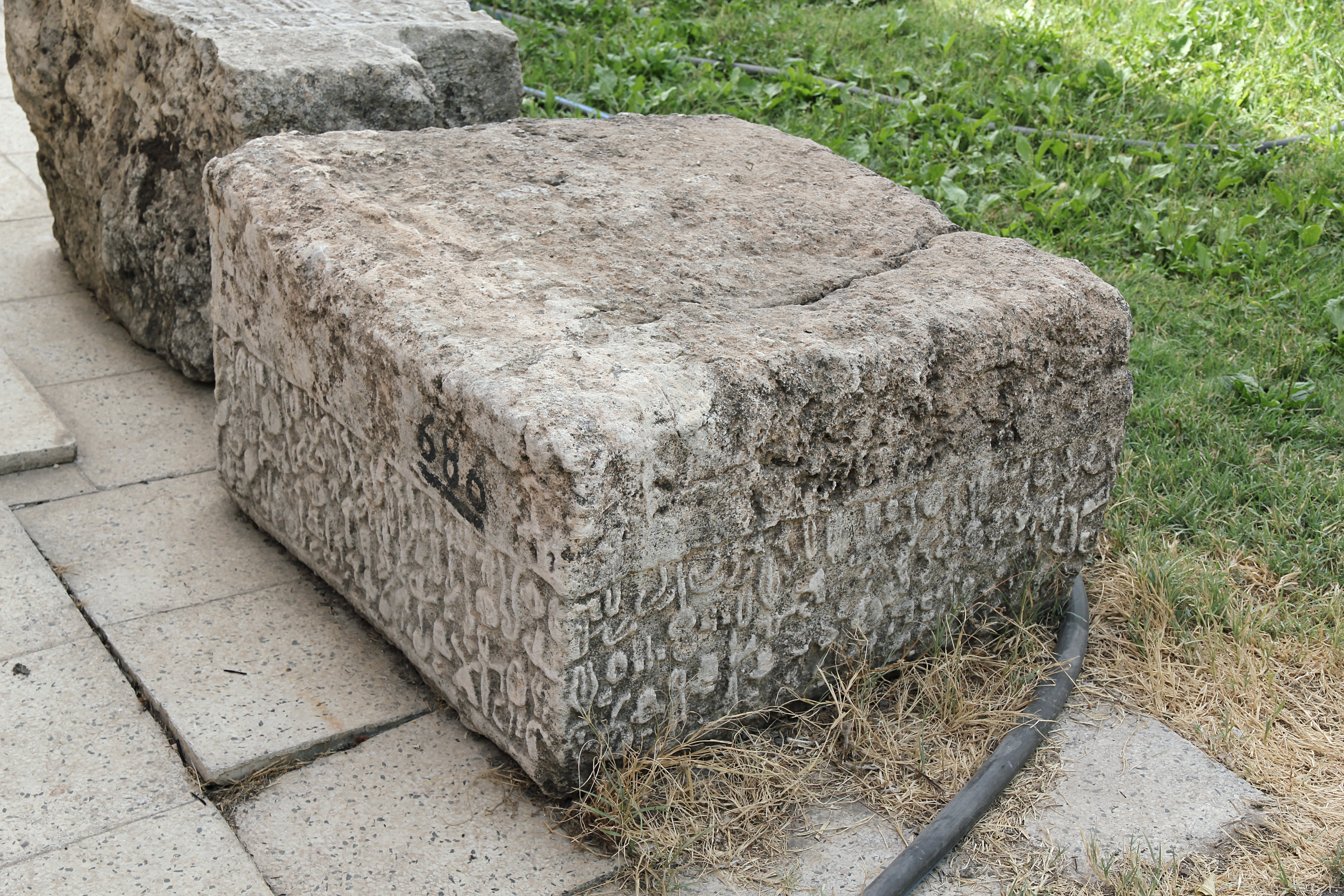 Inschrift Ancoz 7 im Archäologischen Museum Adıyaman, Gesamtansicht (kopfüber)